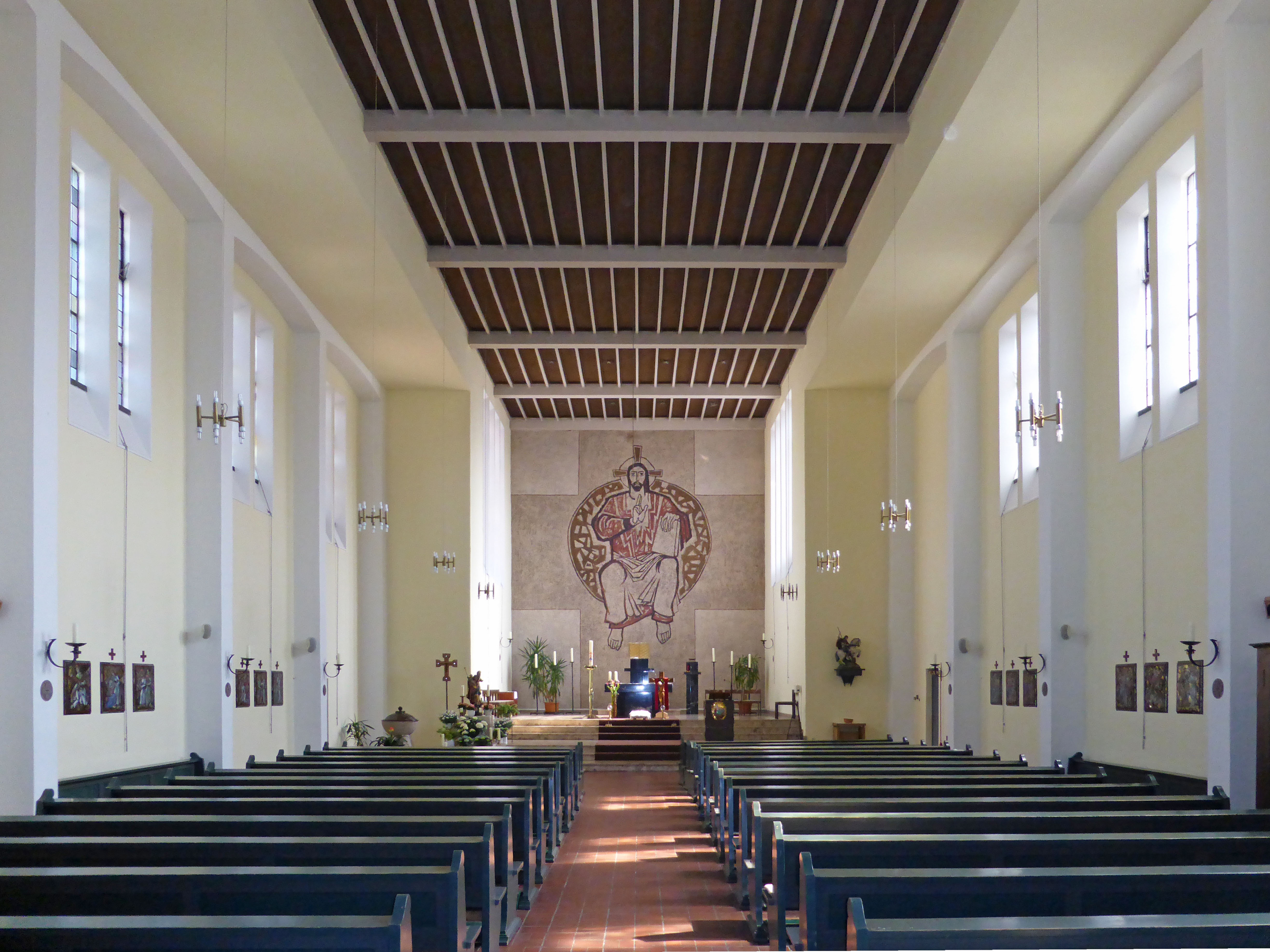 Katholische St.-Bernward-Kirche in Salzgitter-Steterburg.